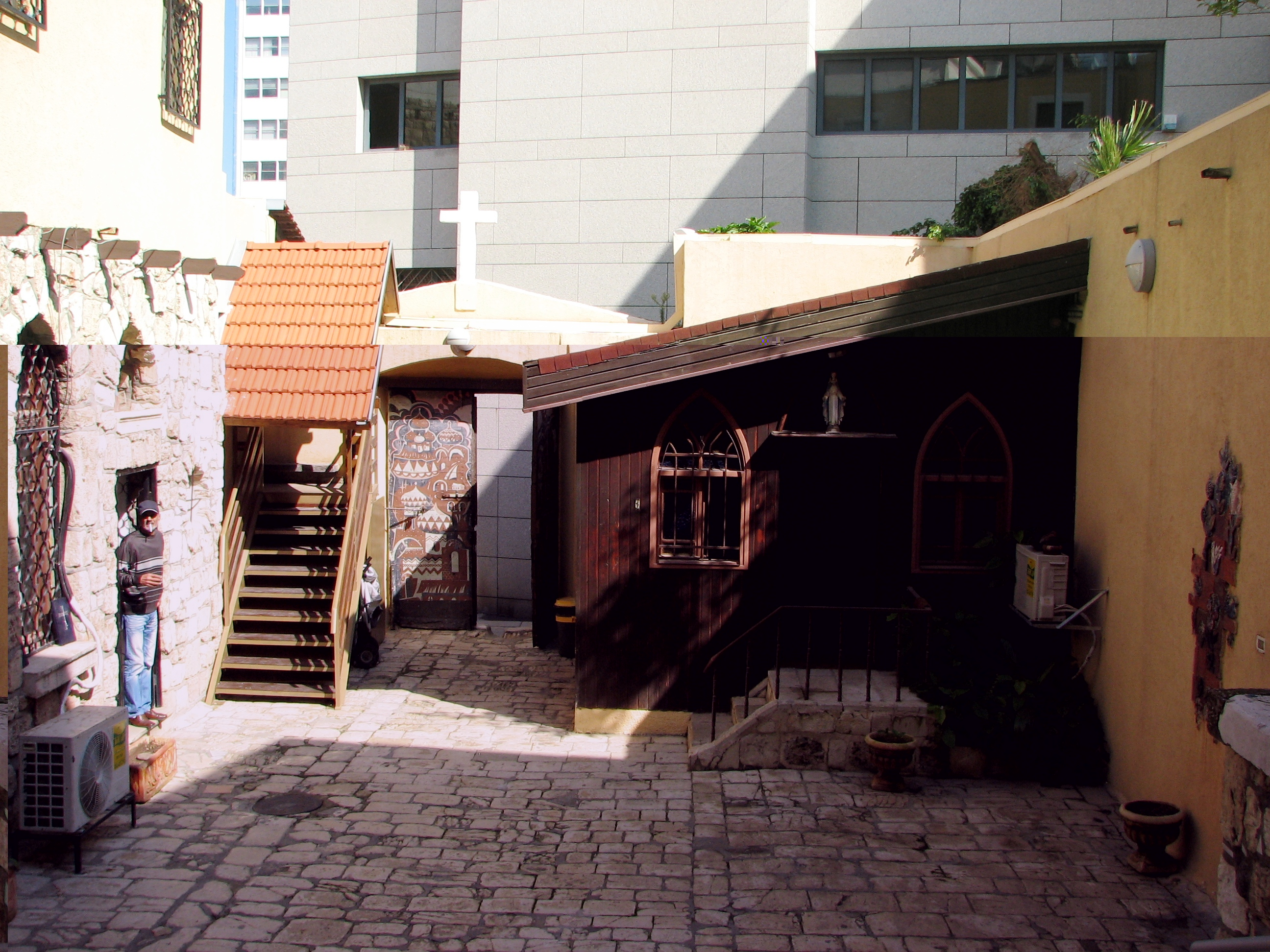 House of Grace, Haifa, Israel הכנסייה היוונית-קתולית הקימה בשנת 1859 כנסייה בשם "א-סיידה". היום משמש הבית מוסד שיקומי לאסירים משוחררים ובית מחסה לנשים נזקקות שוכן בשדרות הפלי"ם בעיר התחתית בחיפה חצר המתחם מבט לכוון צפון. משמאל מבנה המשרדים והפעילות של העמותה